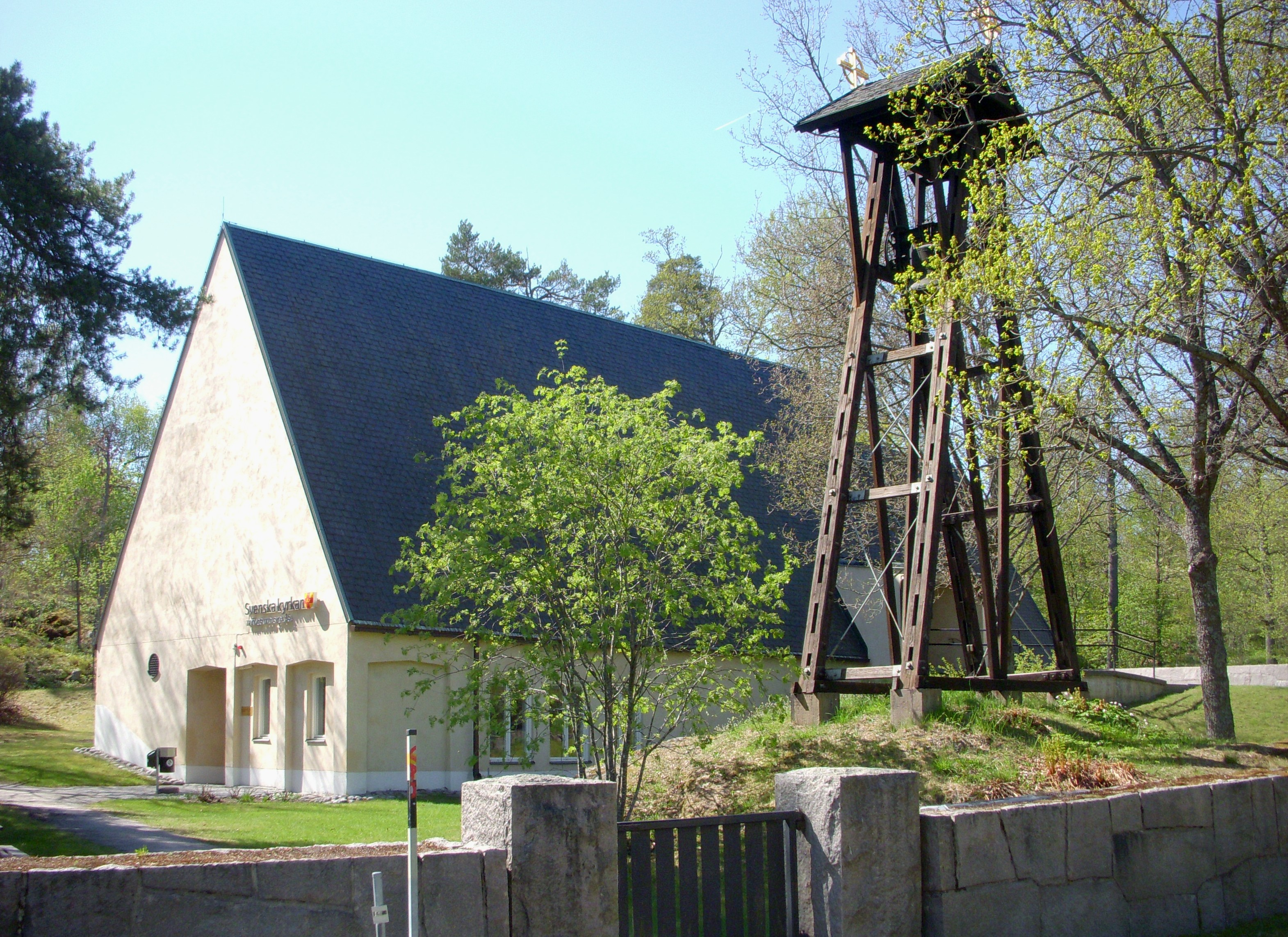 Tacksägelsekyrkan Tyresö